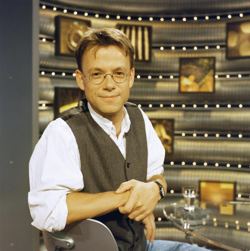 Hans Smit.